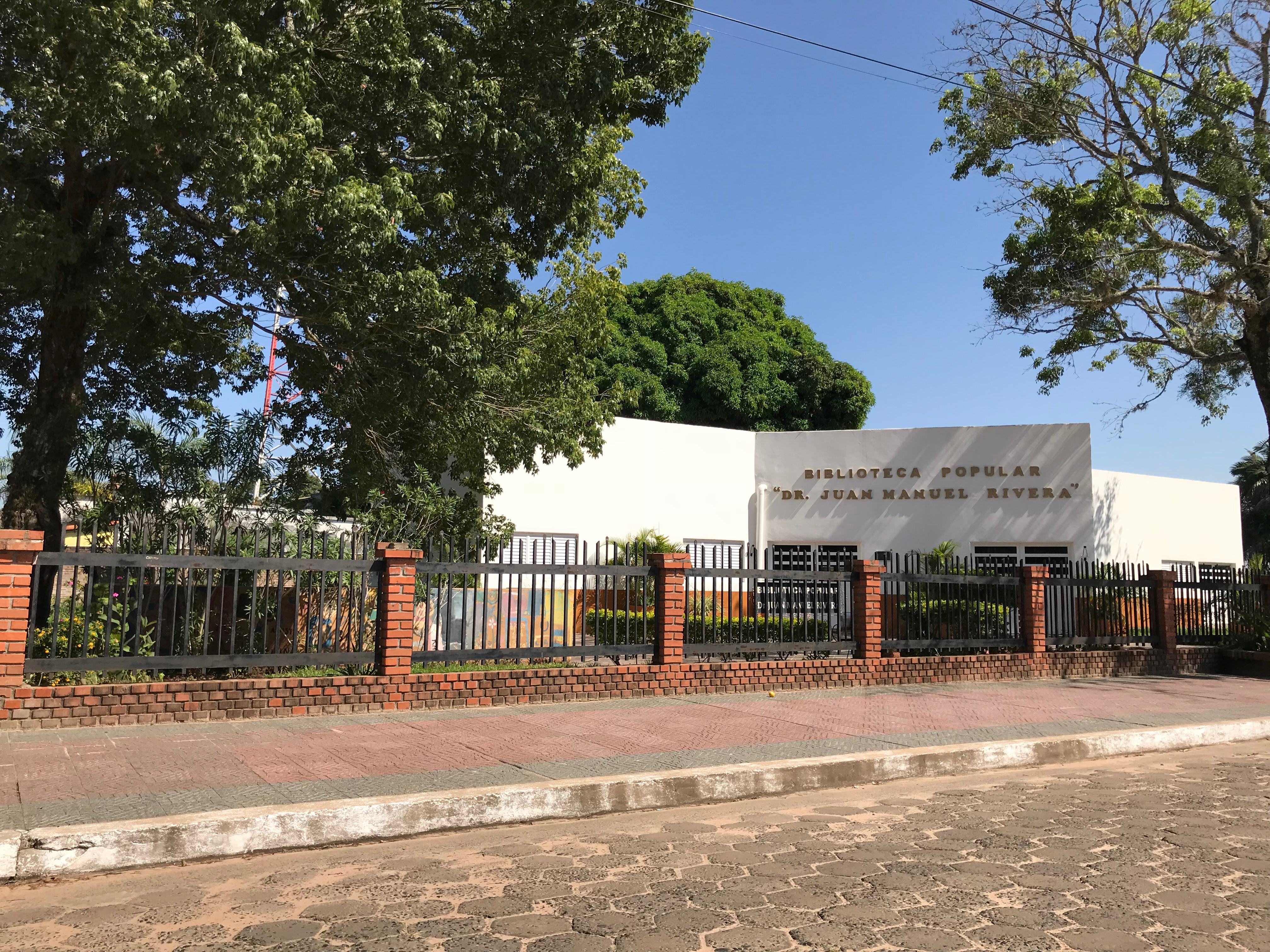 Biblioteca Popular Dr. Juan Manuel Rivera, de Caá Catí, Corrientes, Argentina.